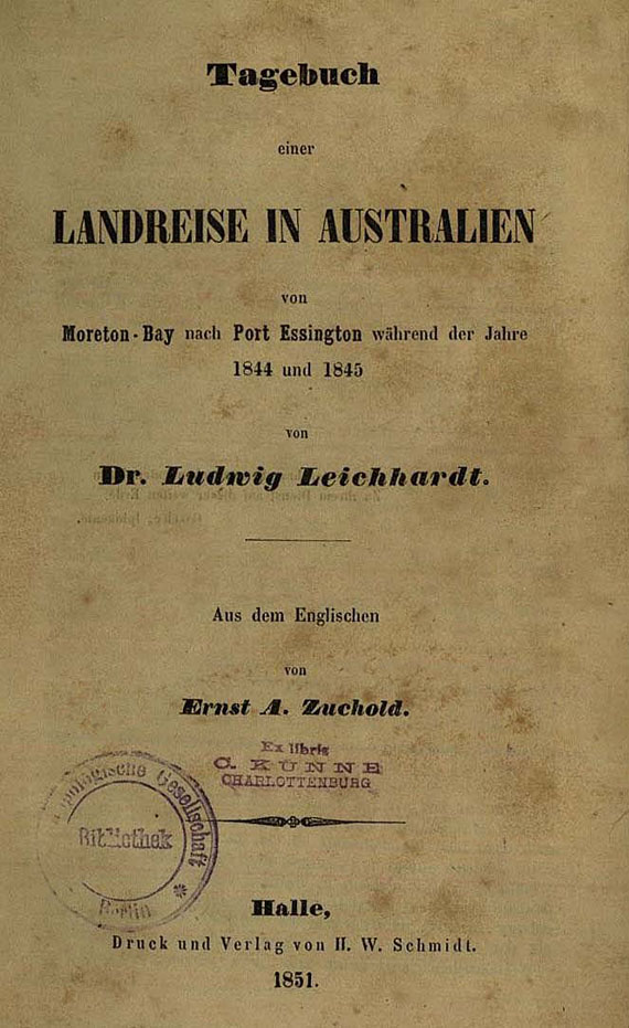 Tagebuch einer Landreise in Australien von Moreton-Bay nach Port Essington während der Jahre 1844 und 1845. Aus dem Englischen von Ernst A. Zuchold. Halle, Druck und Verlag von H. W. Schmidt. 1851. First German edition, Stamp: "Ex libris C. Künne Charlottenburg", Stamp: "Anthropologische Gesellschaft Berlin Bibliothek"